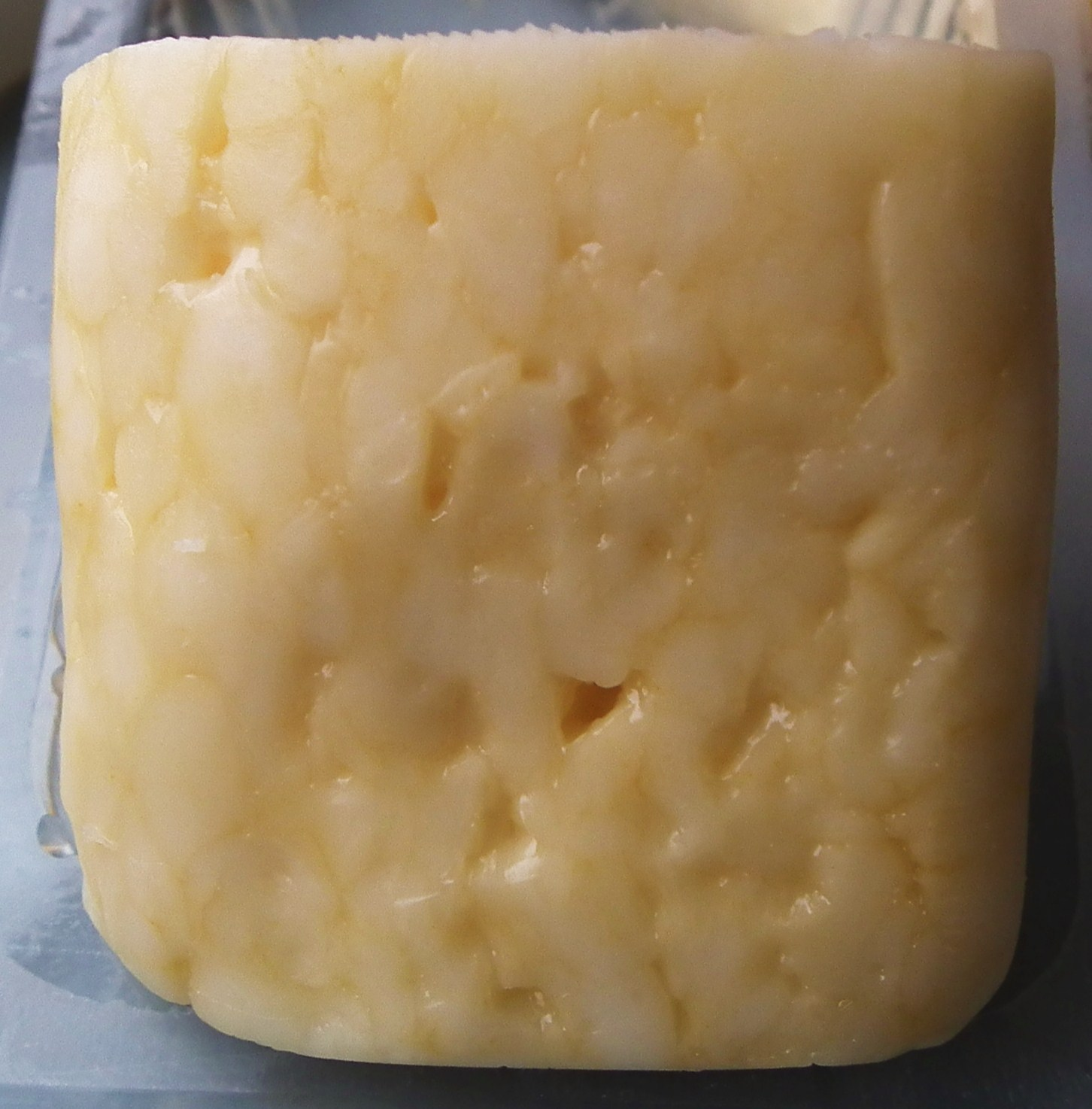 Blaťácké zlato - czeski ser.